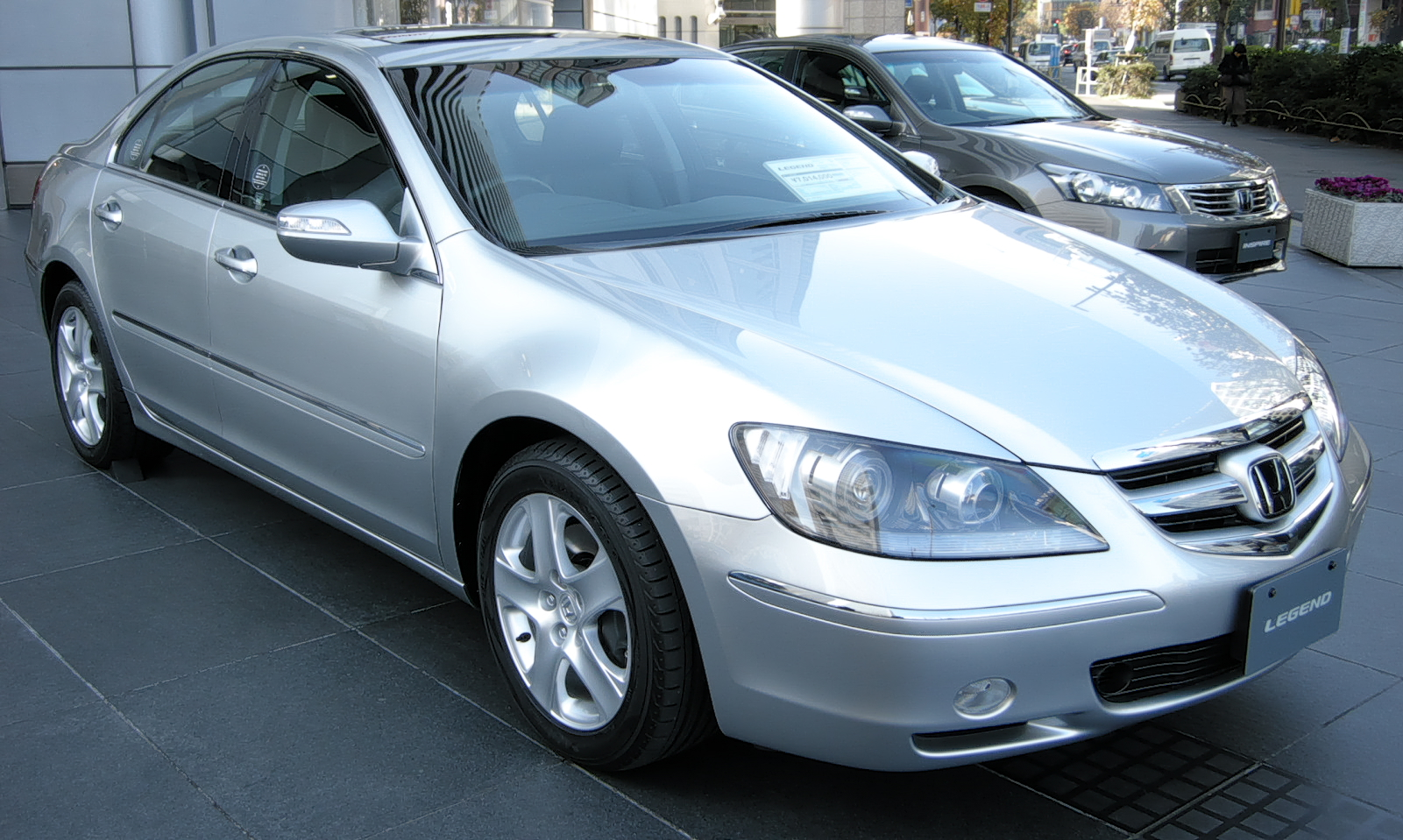 2007 Honda Legend in Honda Welcome Plaza